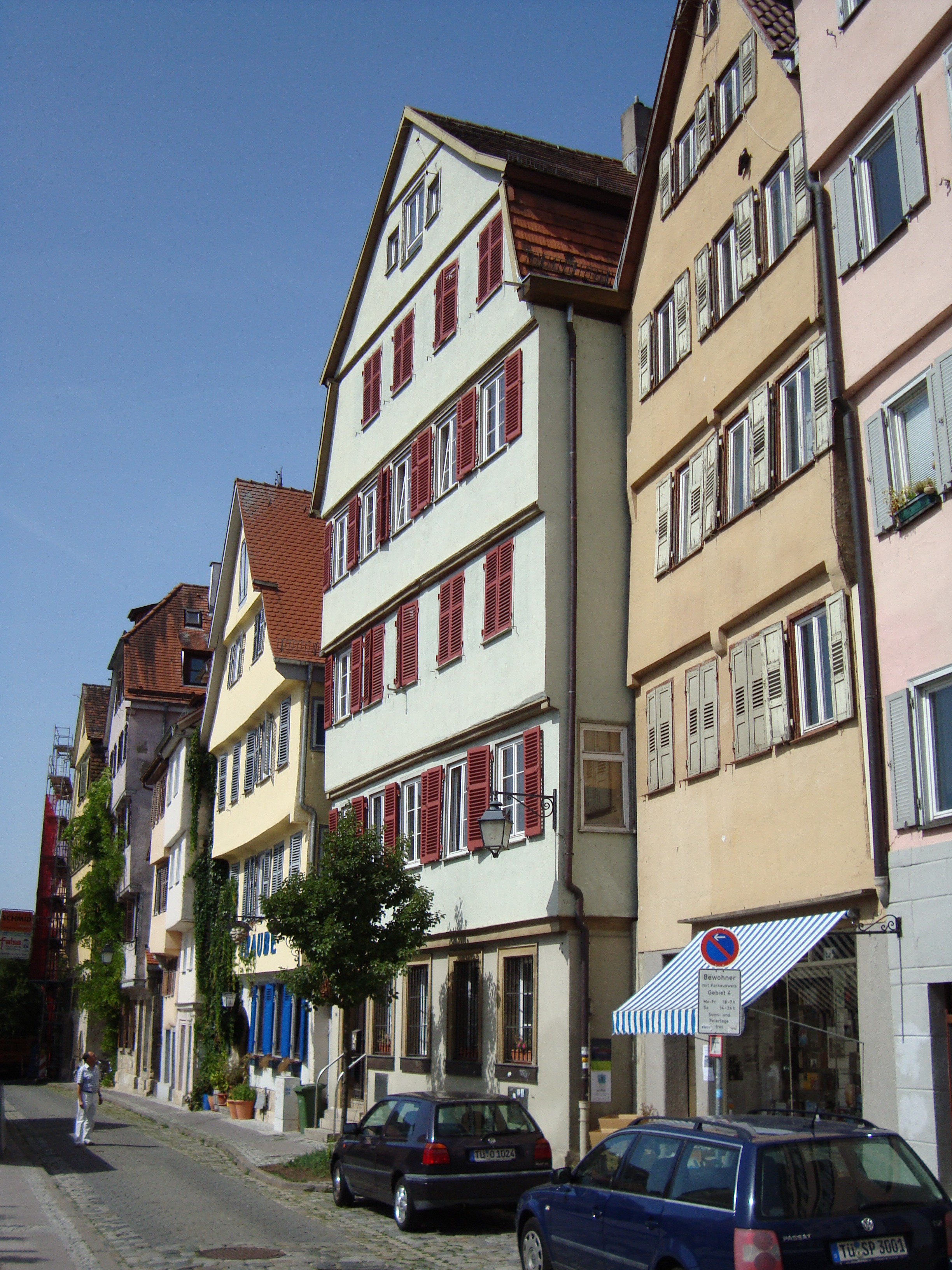 Geburtshaus von Albert Knapp in der Neckarhalde 12 Tübingen. Ein Bäumchen verdeckt den Eingang mit einer Gedenktafel für Albert Knapp.